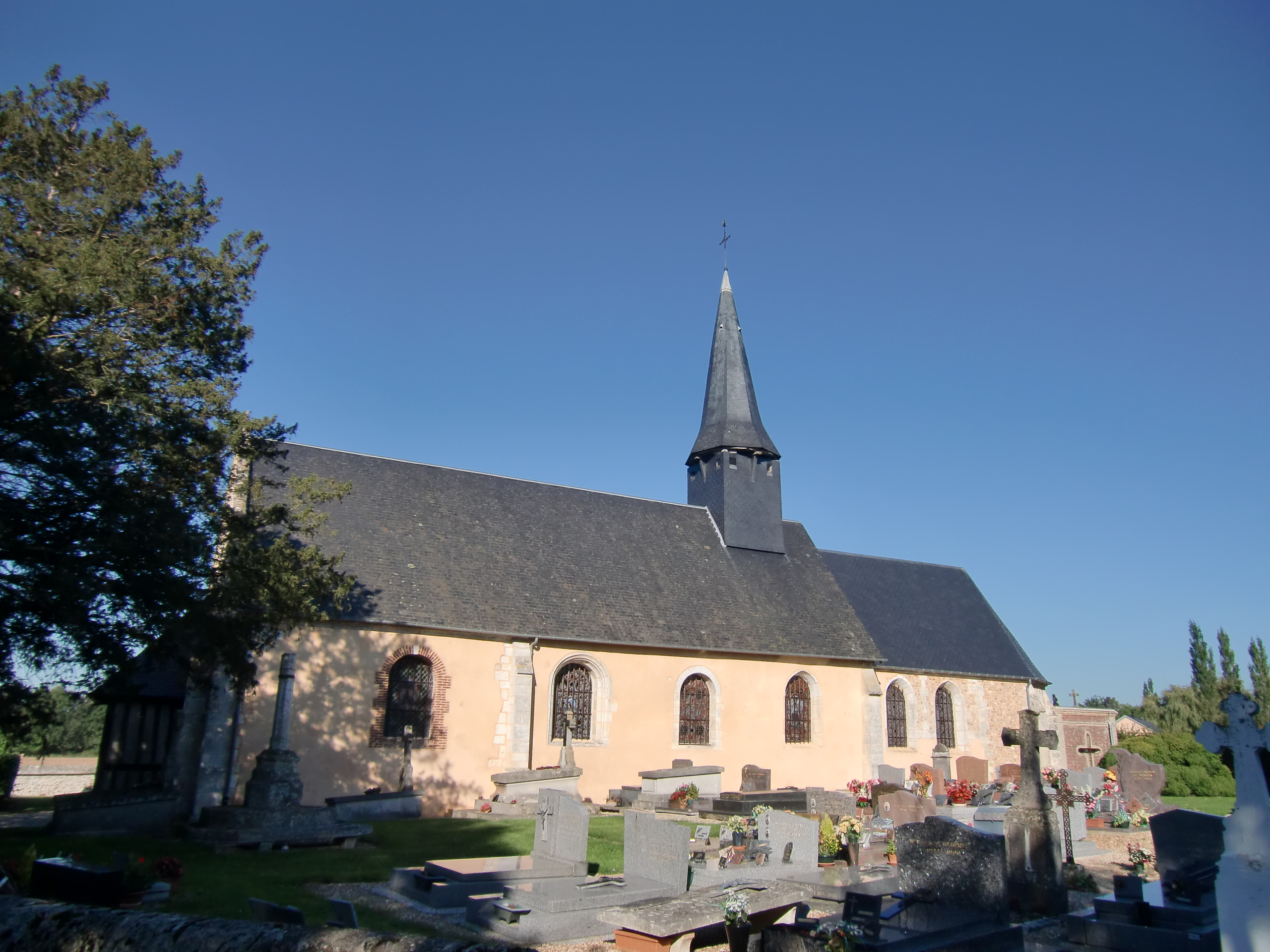 Église de Saint-Thurien (Eure, Normandie, France)